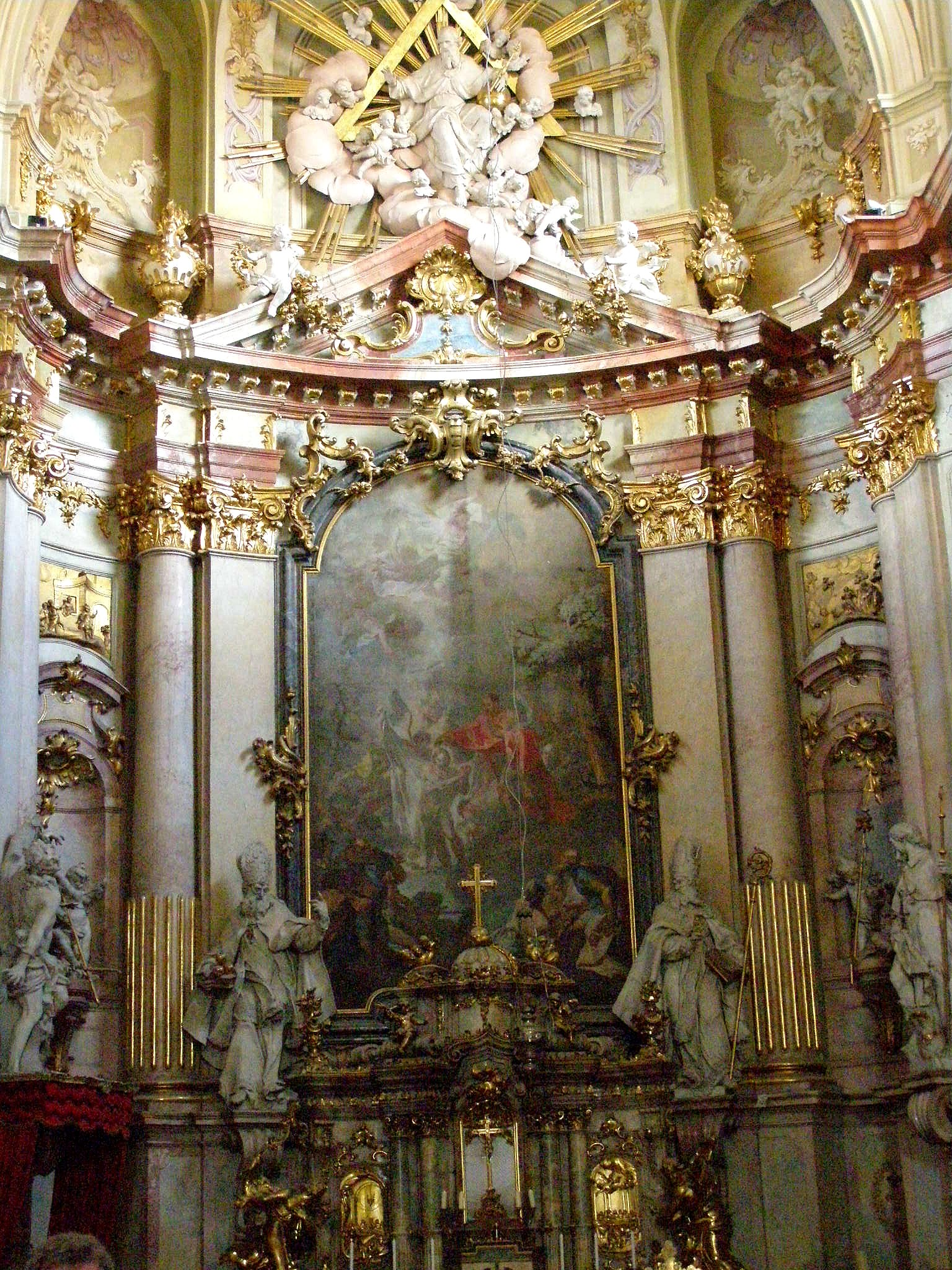 Hlavný oltár Kostola svätého Jána Krstiteľa s výjavom Krstu Ježiša Krista